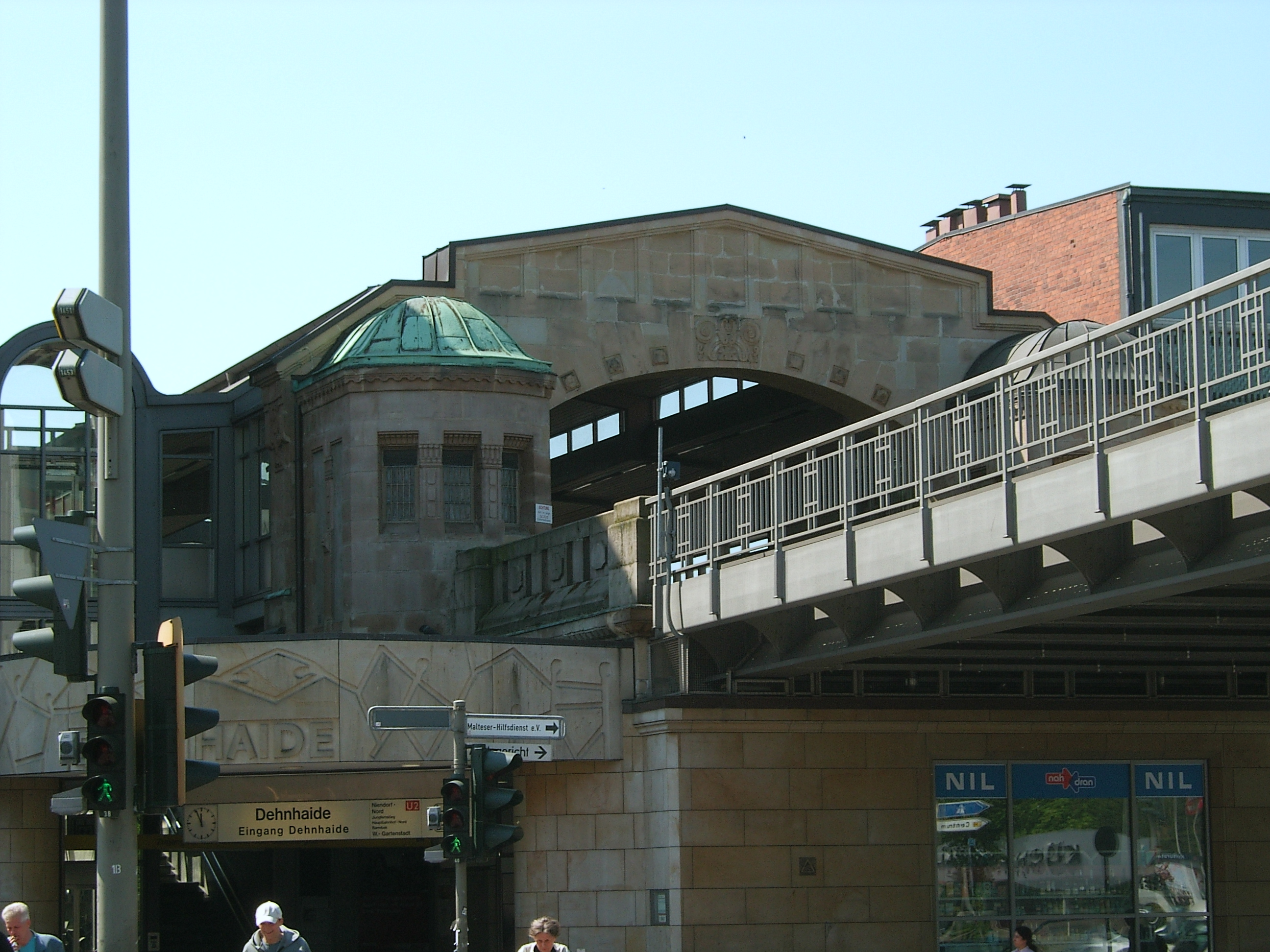 Hamburg, Barmbek, U-Bahnhof Dehnhaide